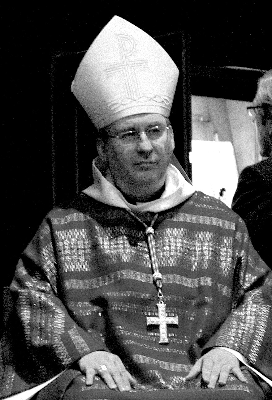 Mgr Vincent Jordy en mai 2013